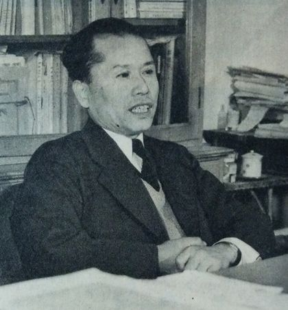 近藤康男